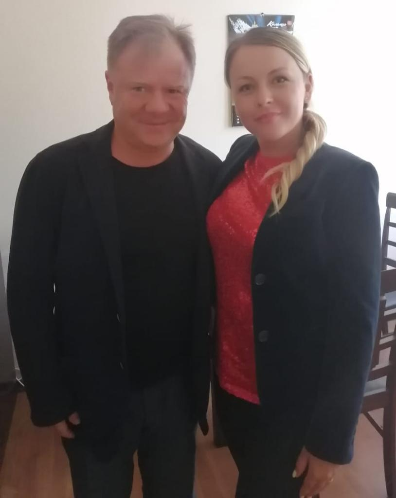 ВИА «Пламя» под руководством Юлии Ариничевой.